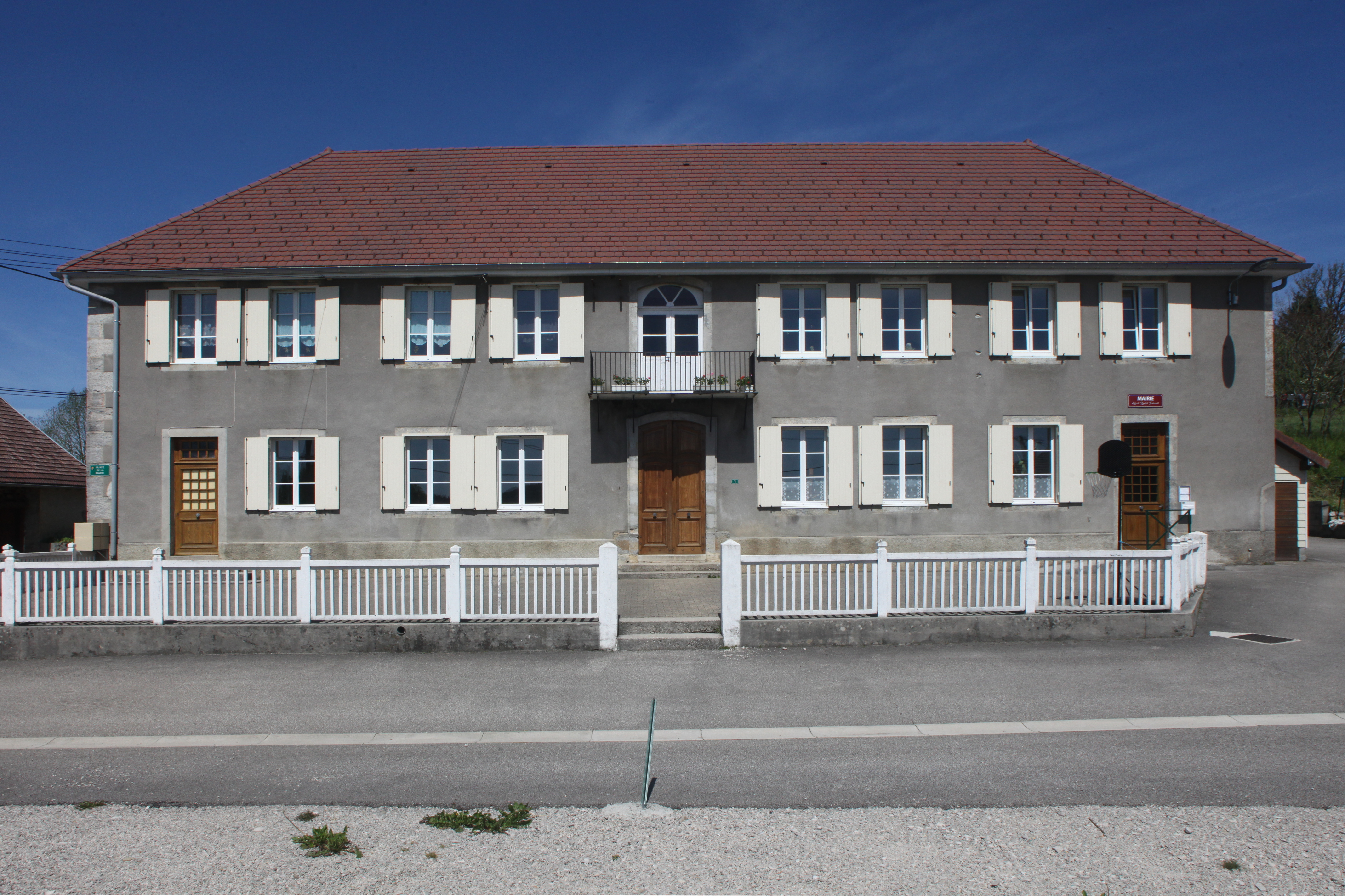 Mairie de Dournon (Jura).